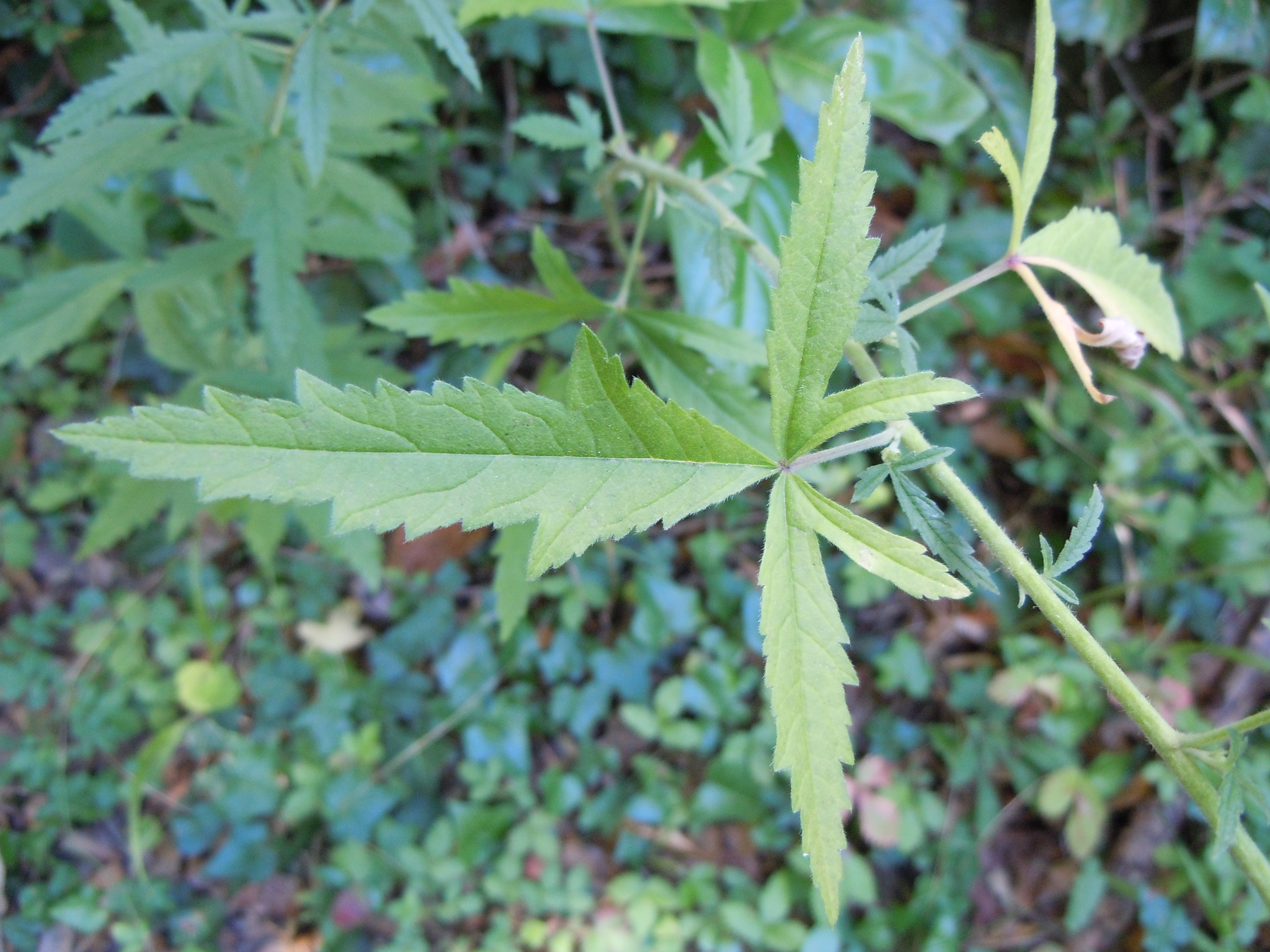 Feuille de Guimauve faux-chanvre - Althaea cannabina, Forêt de Banne, Ardèche View of the flower